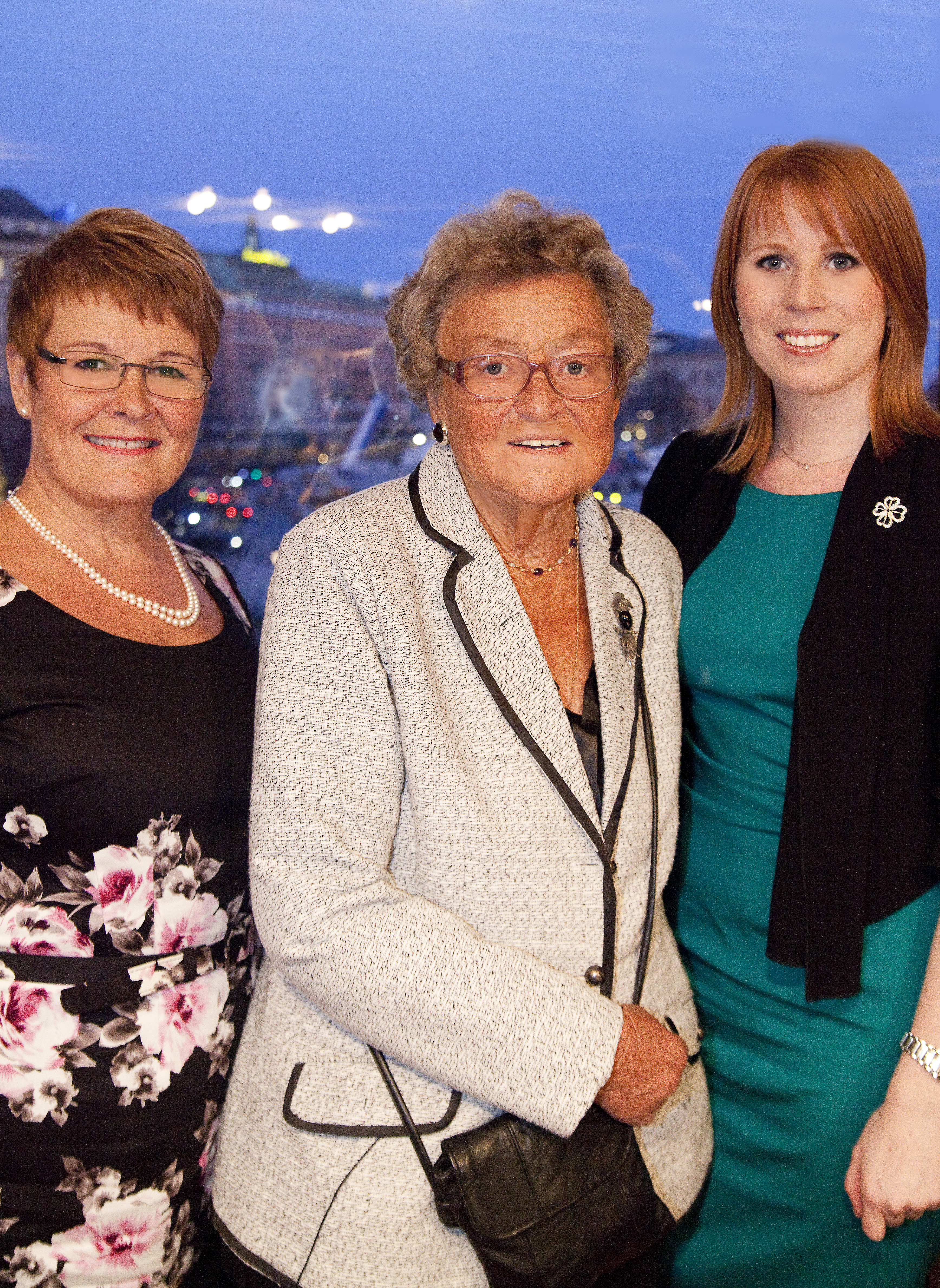 Tre generationer Centerledare. Från vänster till höger: Maud Olofsson, Karin Söder och Annie Lööf.